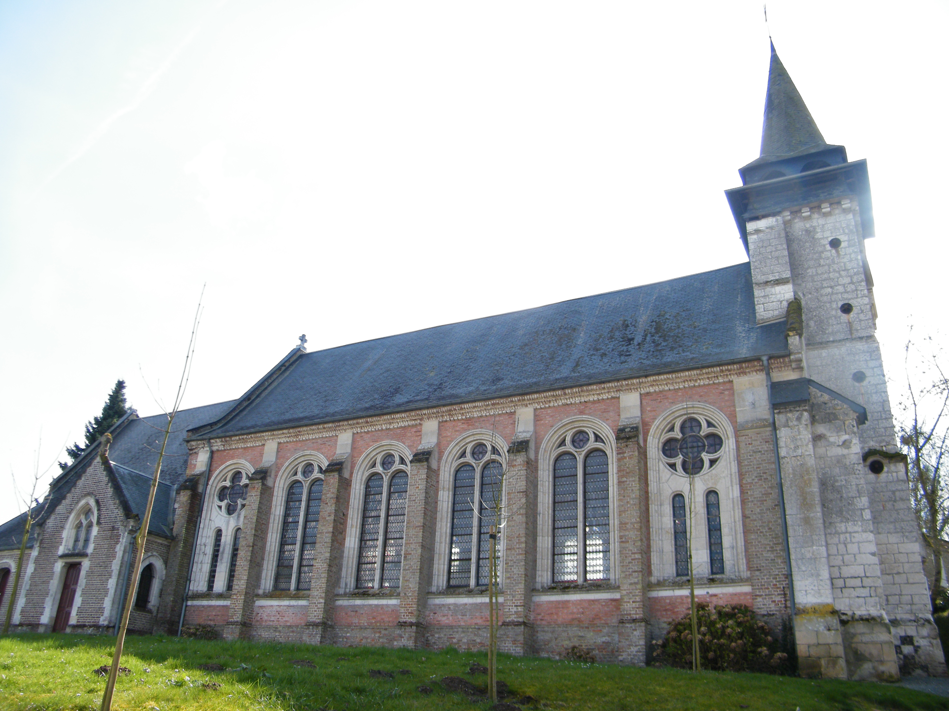 L'église, côté nord.